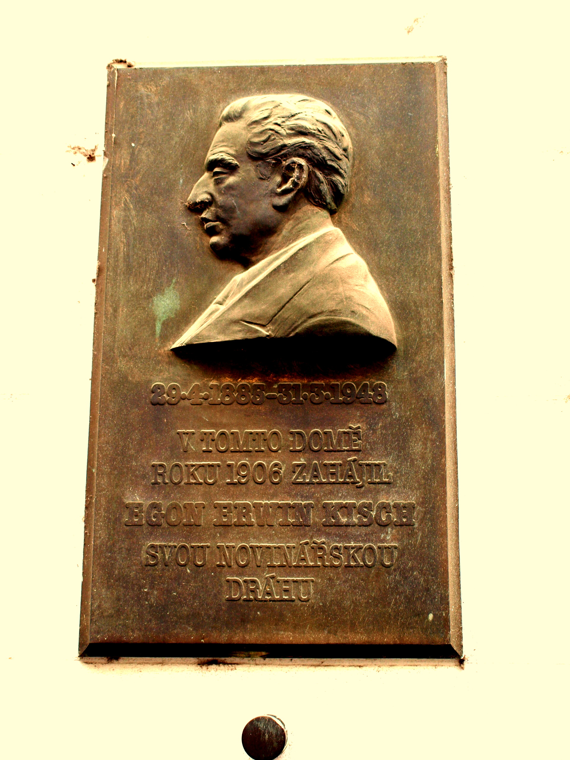 Millesimovský palác Panská 8